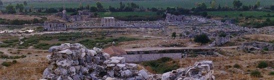 Milet. Blick vom byzantinischen Kastell auf dem Theater auf das Zentrum der hellenistisch-römischen Stadt. 1997 fotografiert durch I. Panteleon.